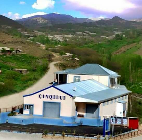 Keçilidə Çınqıllı